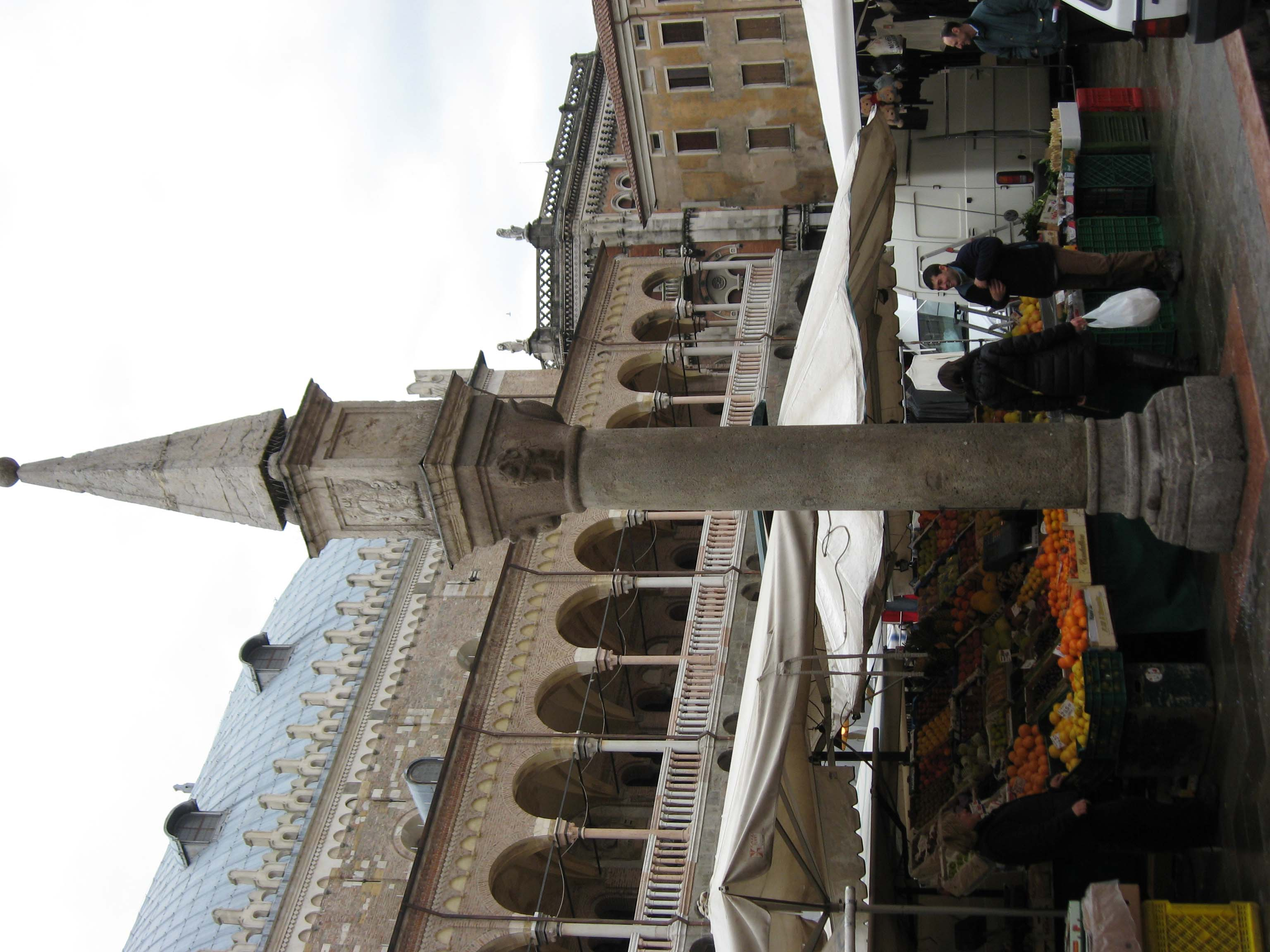 Peronio